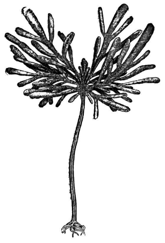 Ecklonia bicyclis = Eisenia bicyclis